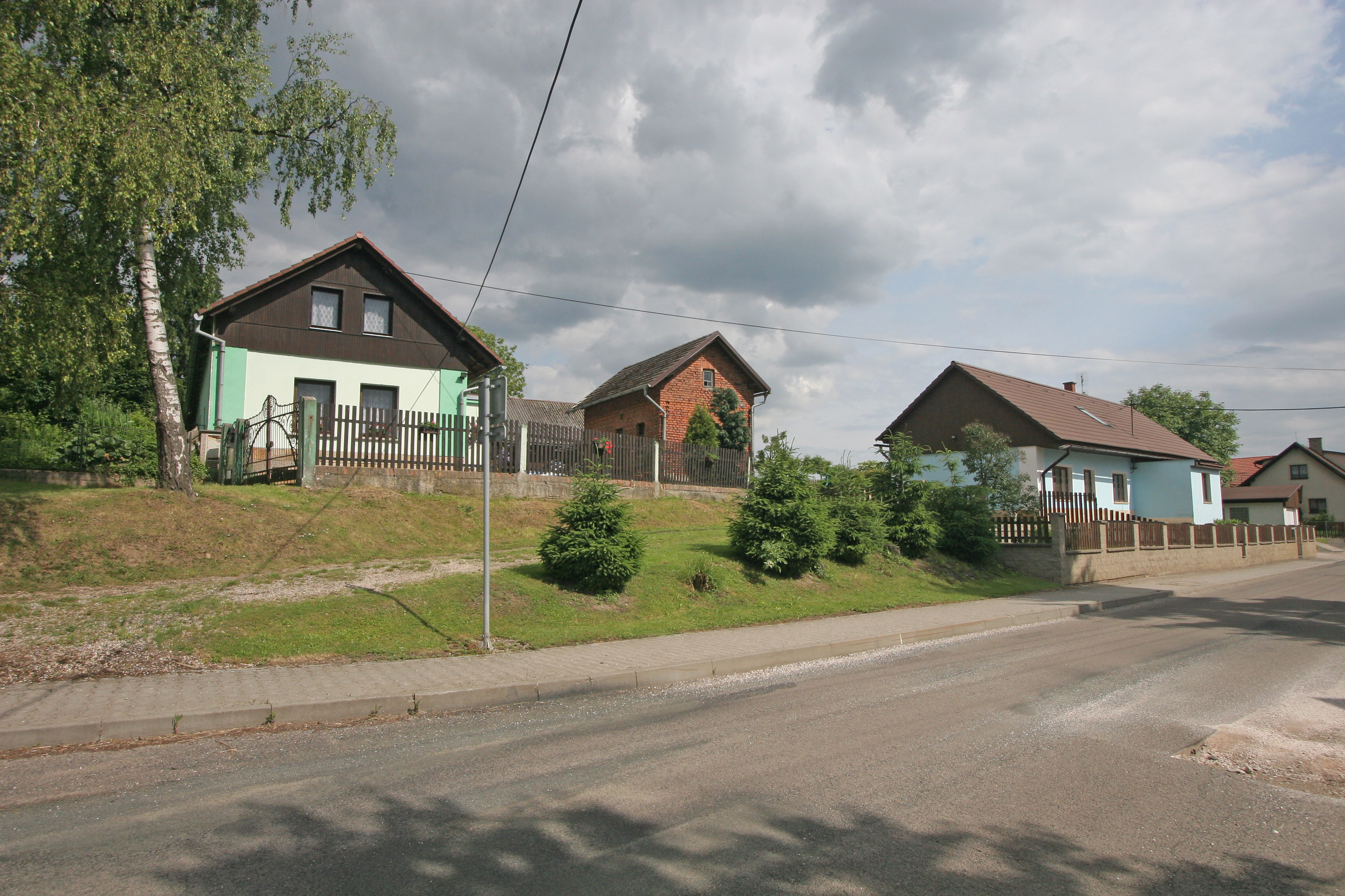 Třebovětice čp. 17